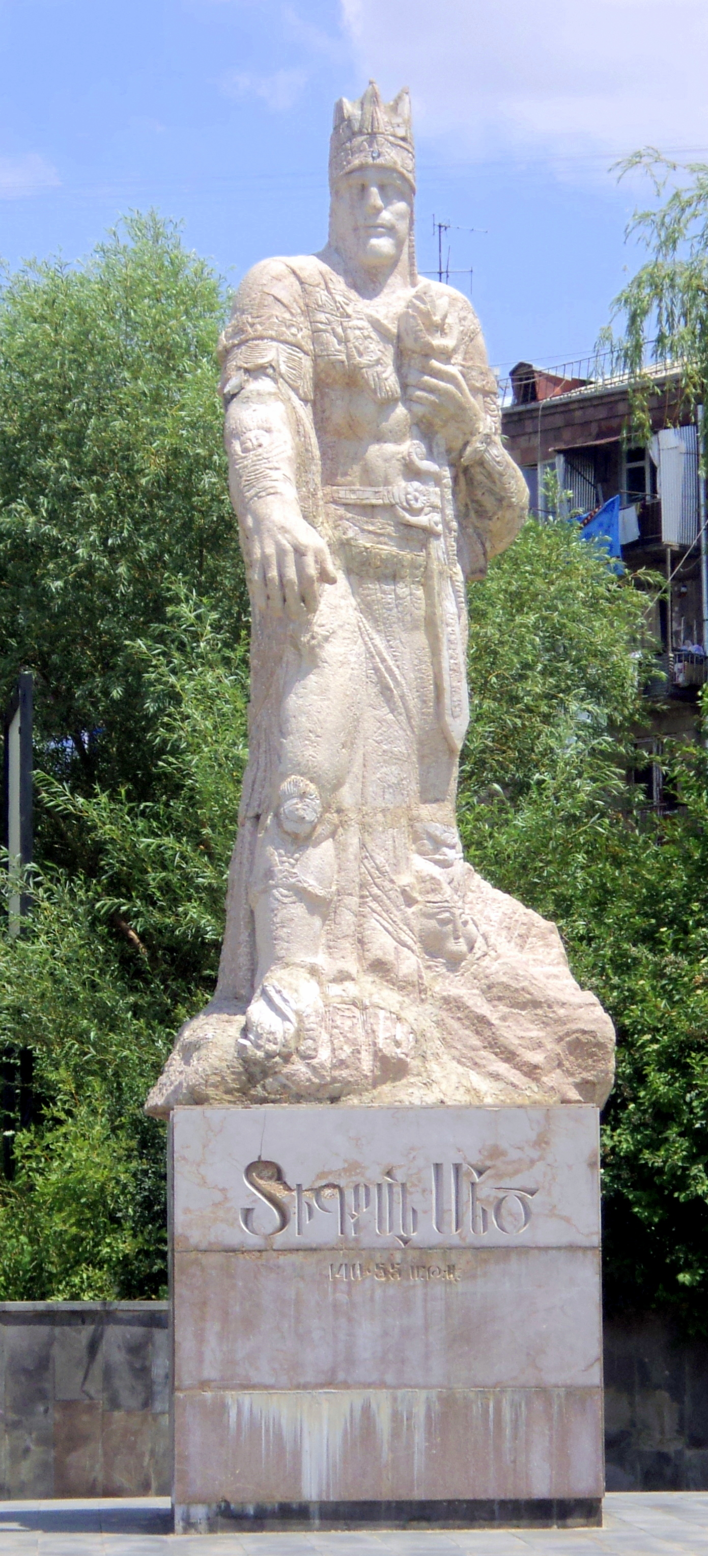 Տիգրան Մեծ - մարմար և գրանիտ, հեղինակ` Լևոն Թոքմաջյան, ճարտարապետ` Ռ. Օհանյան։ Տեղադրվել է 2004 թվականին Նոր Նորքի երկրորդ զանգվածում, վիշապների այգու հարևանությամբ: 8/13